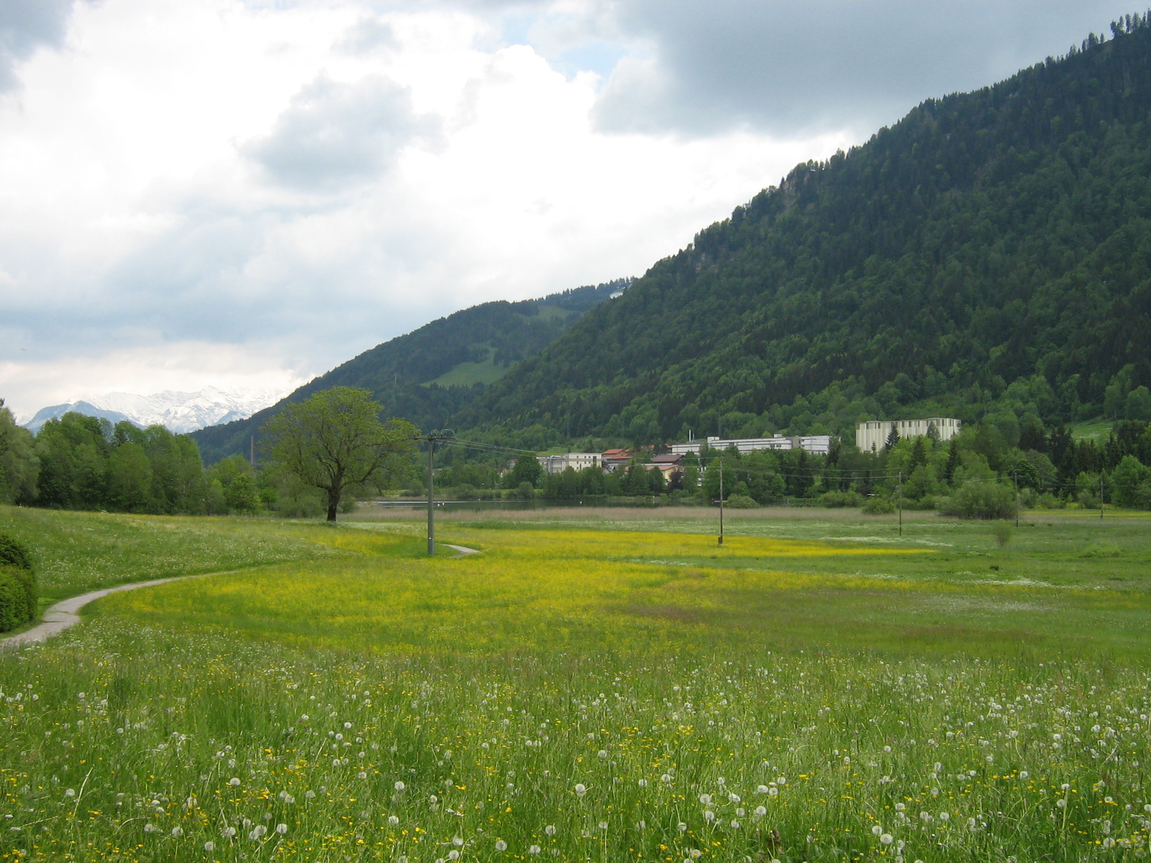 Immenstadt im Allgäu, Blick von Bühl auf kl. Alpsee und Kunert-Gebäude